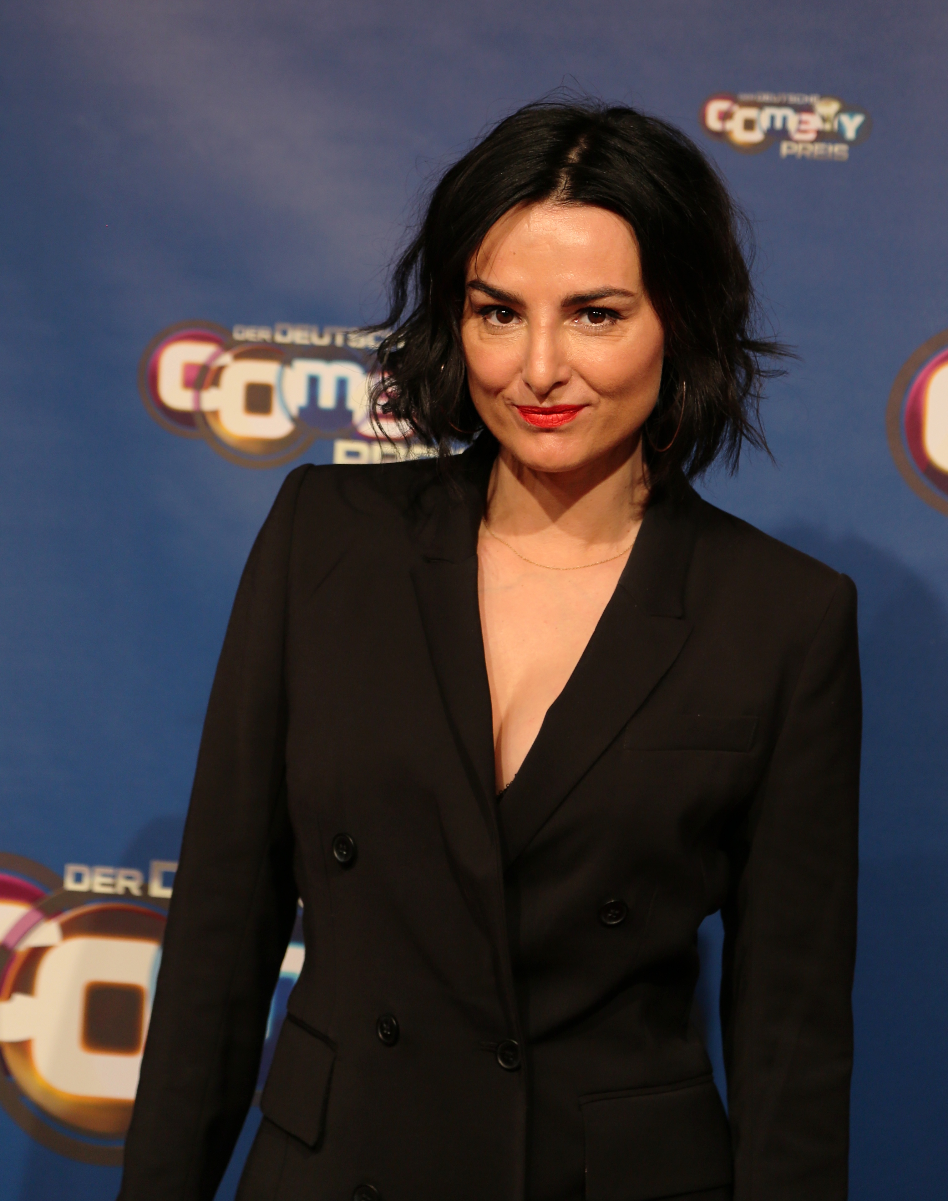 Mimi Fiedler beim Deutschen Comedypreis 2017.